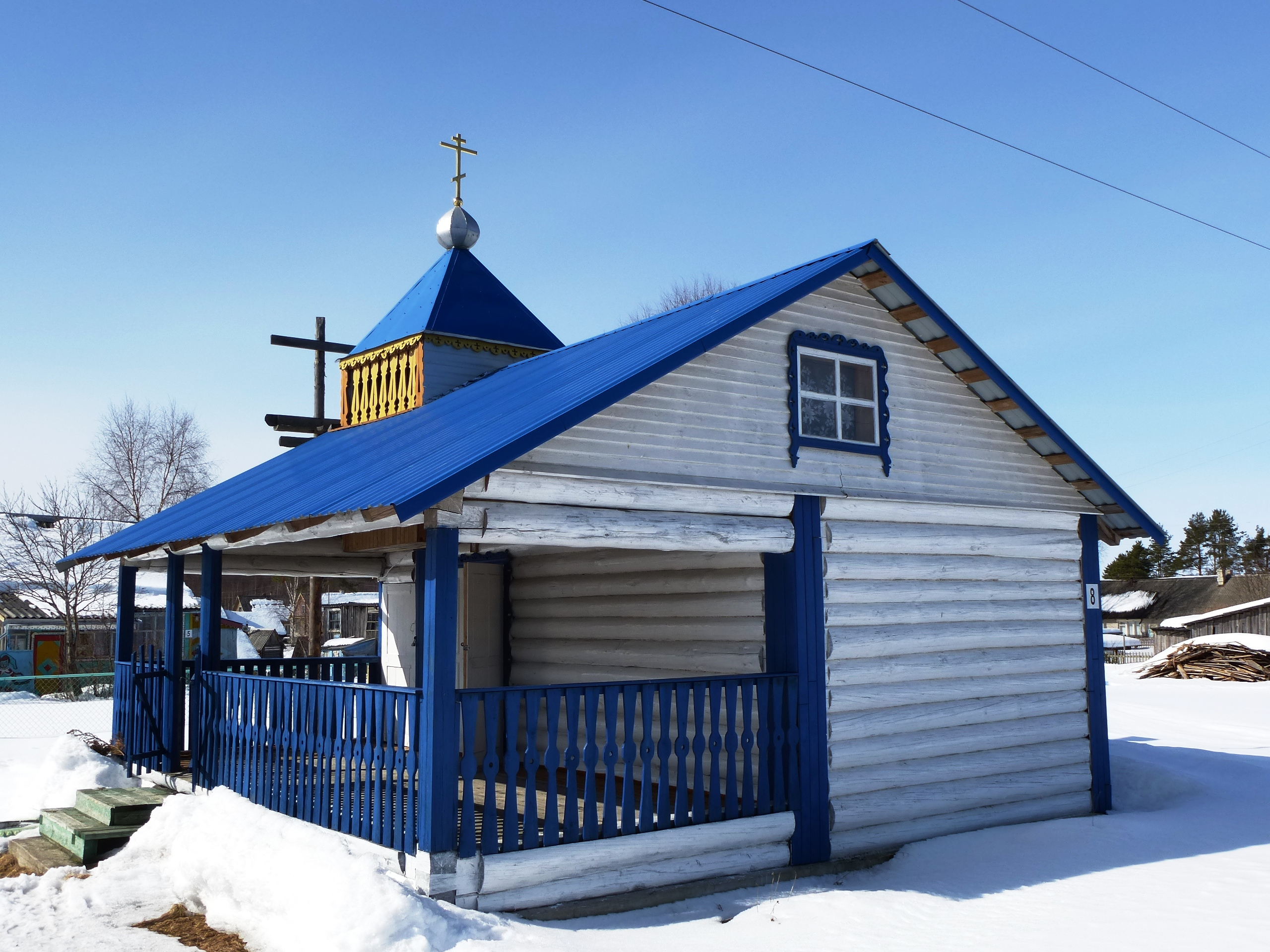 Село Крошнозеро, Республика Карелия.Часовня крестителя Николая.